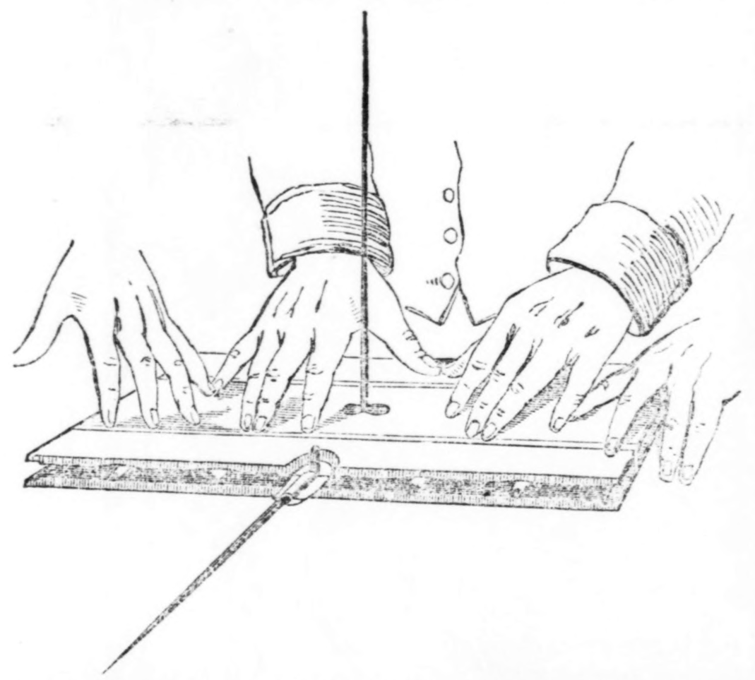 Equipamento desenvolvido por Michael Faraday para explicar o efeito ideomotor nas mesas girantes. The Illustrated London News, 16 de julho de 1853, página 35.